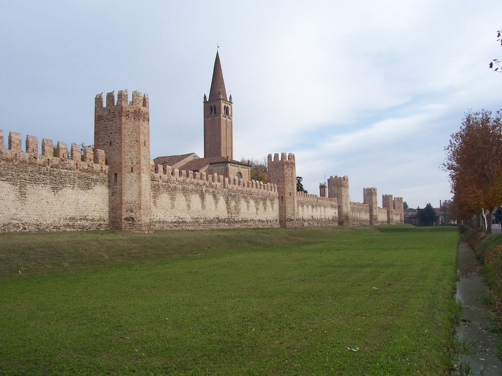 Città murata di Montagnana in provincia di Padova